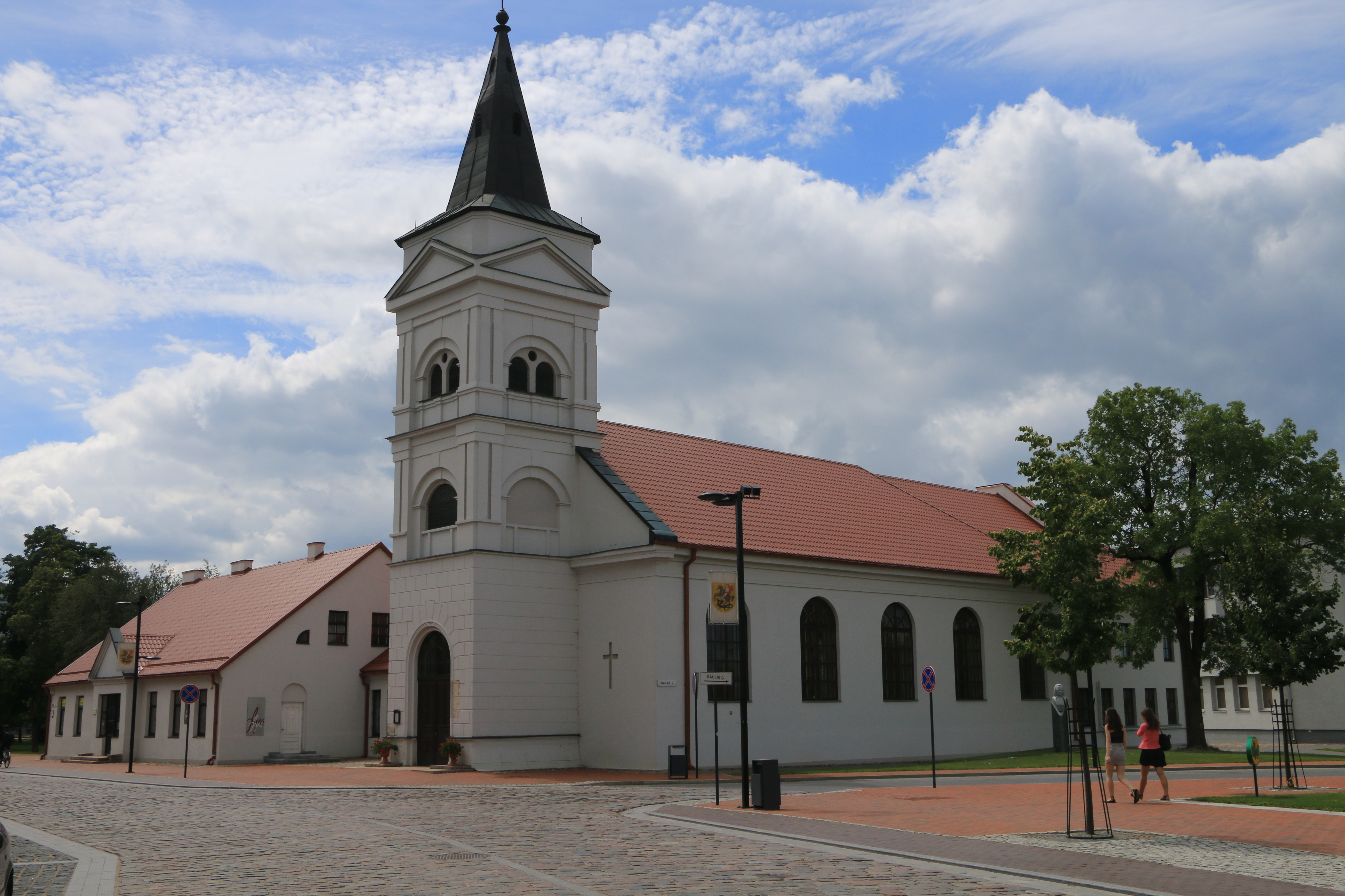 Marijampolė, Lithuania